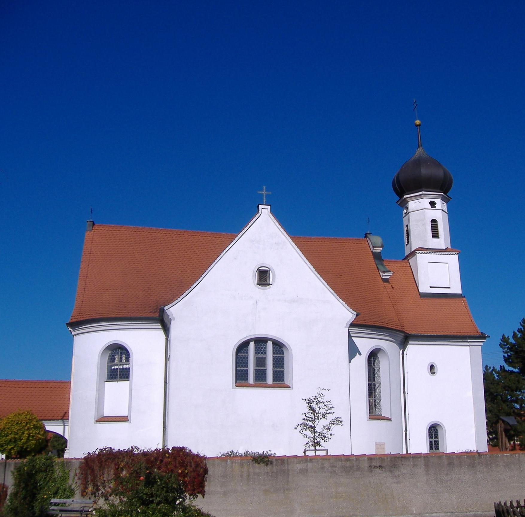 Eggelstetten